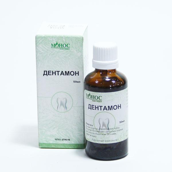 Монгол: Буйлны үрэвслийн эсрэг ургамлын гаралтай бүтээгдэхүүн